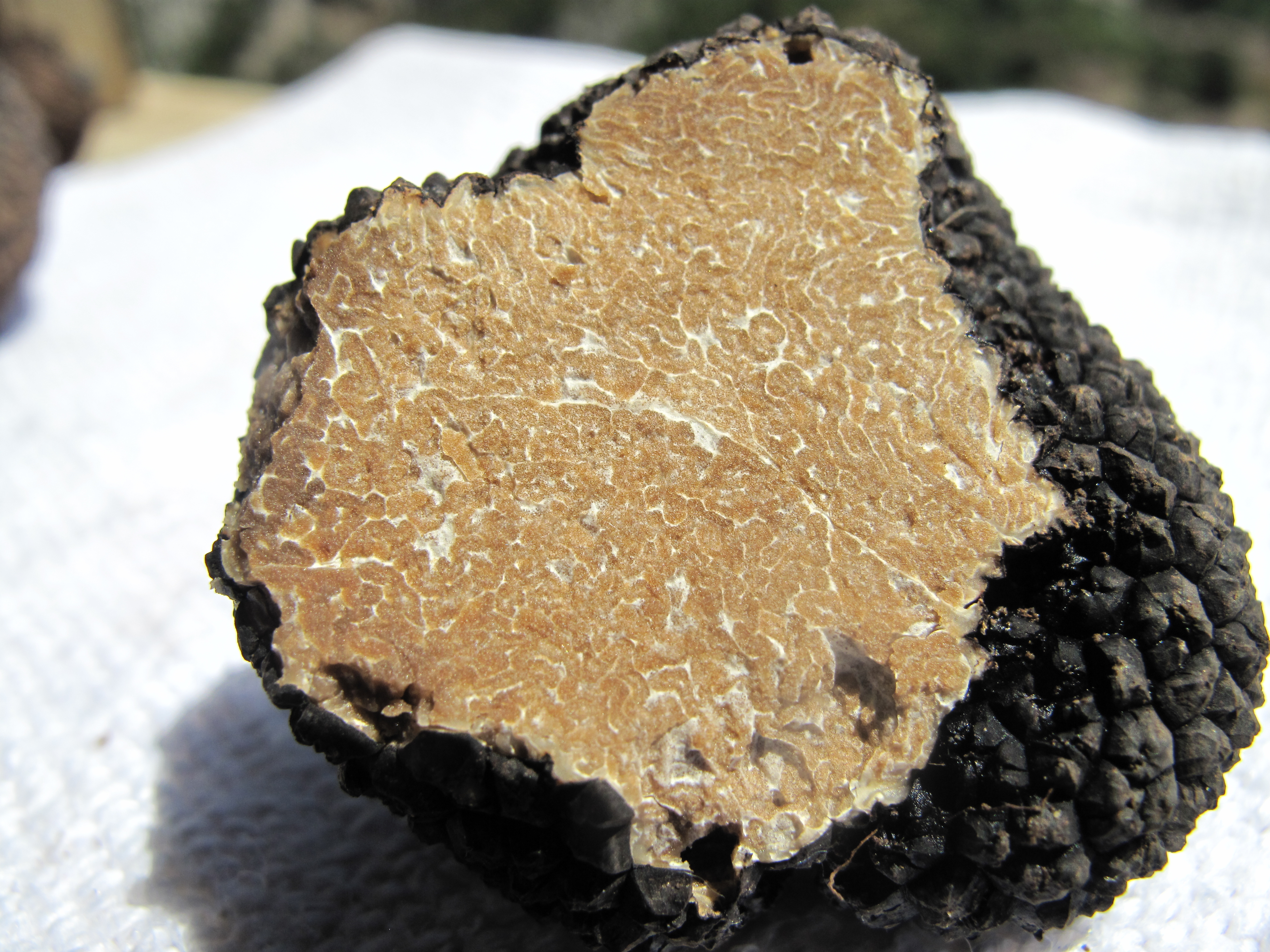 Tartufi neri estivi trovati in Valnerina il 17-07-2010